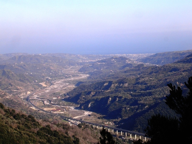 Autore: Gino Larosa OTRS: 2008021510007787